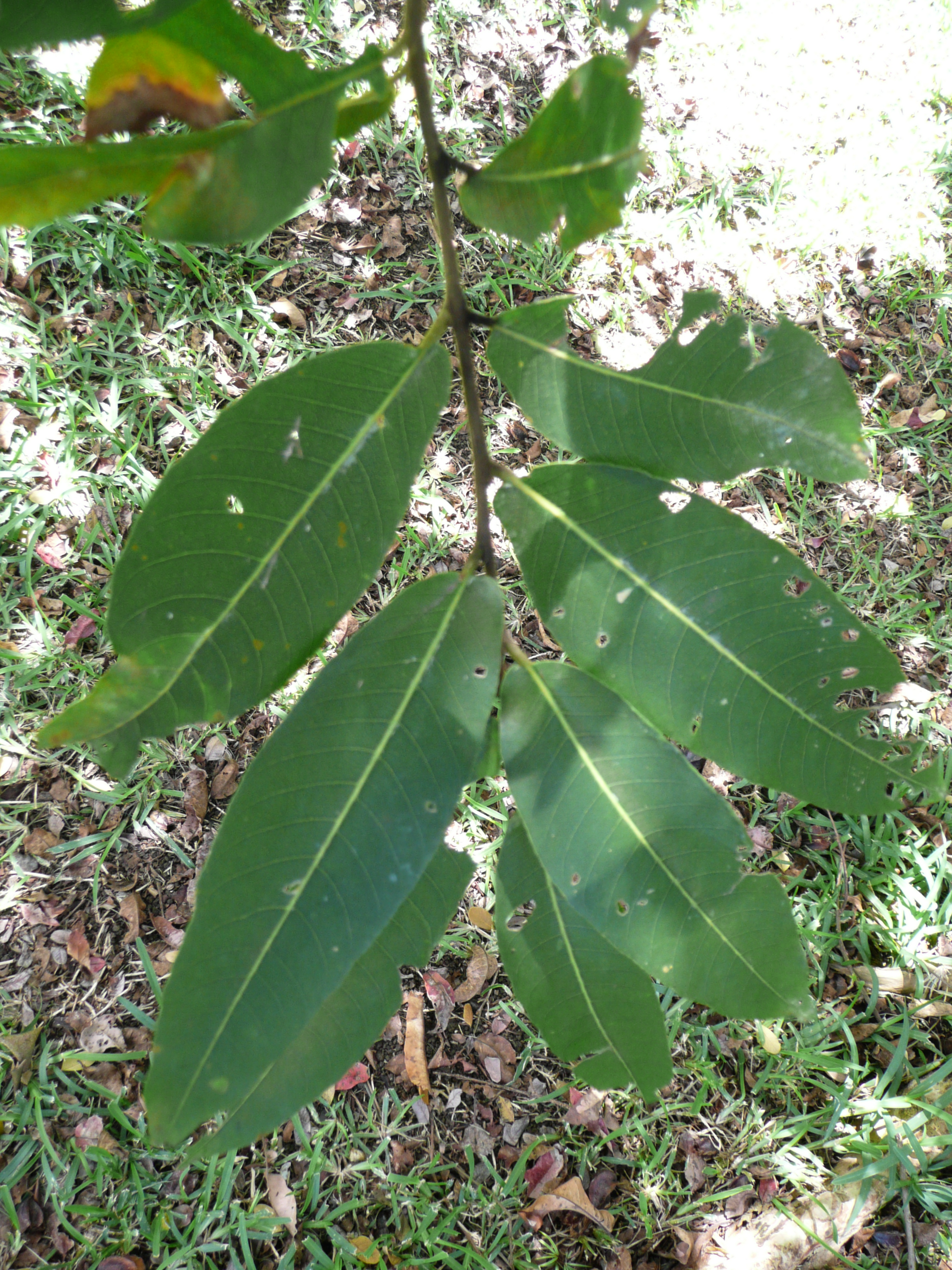 Terminalia arjuna in Sir Seewoosagur Ramgoolam Botanical Garden Map: 20° 6' 25" S 57° 34' 46" E